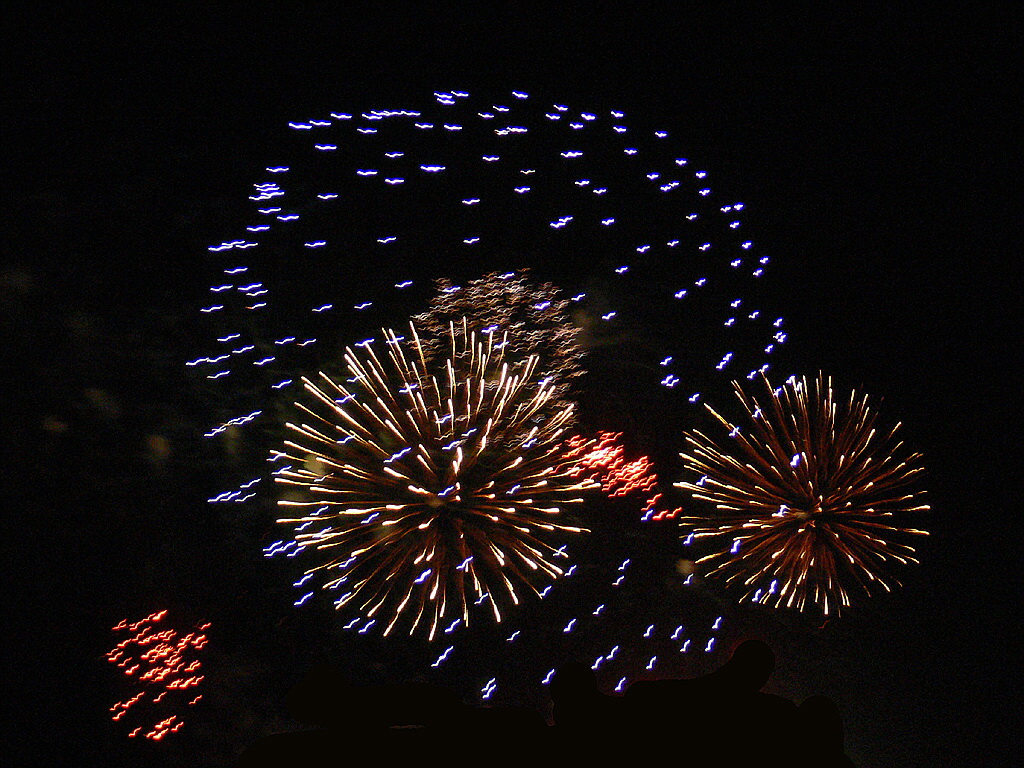 Internationales Feuerwerksfestival in Gera. Freitag 8.9.06: Eric Tucker